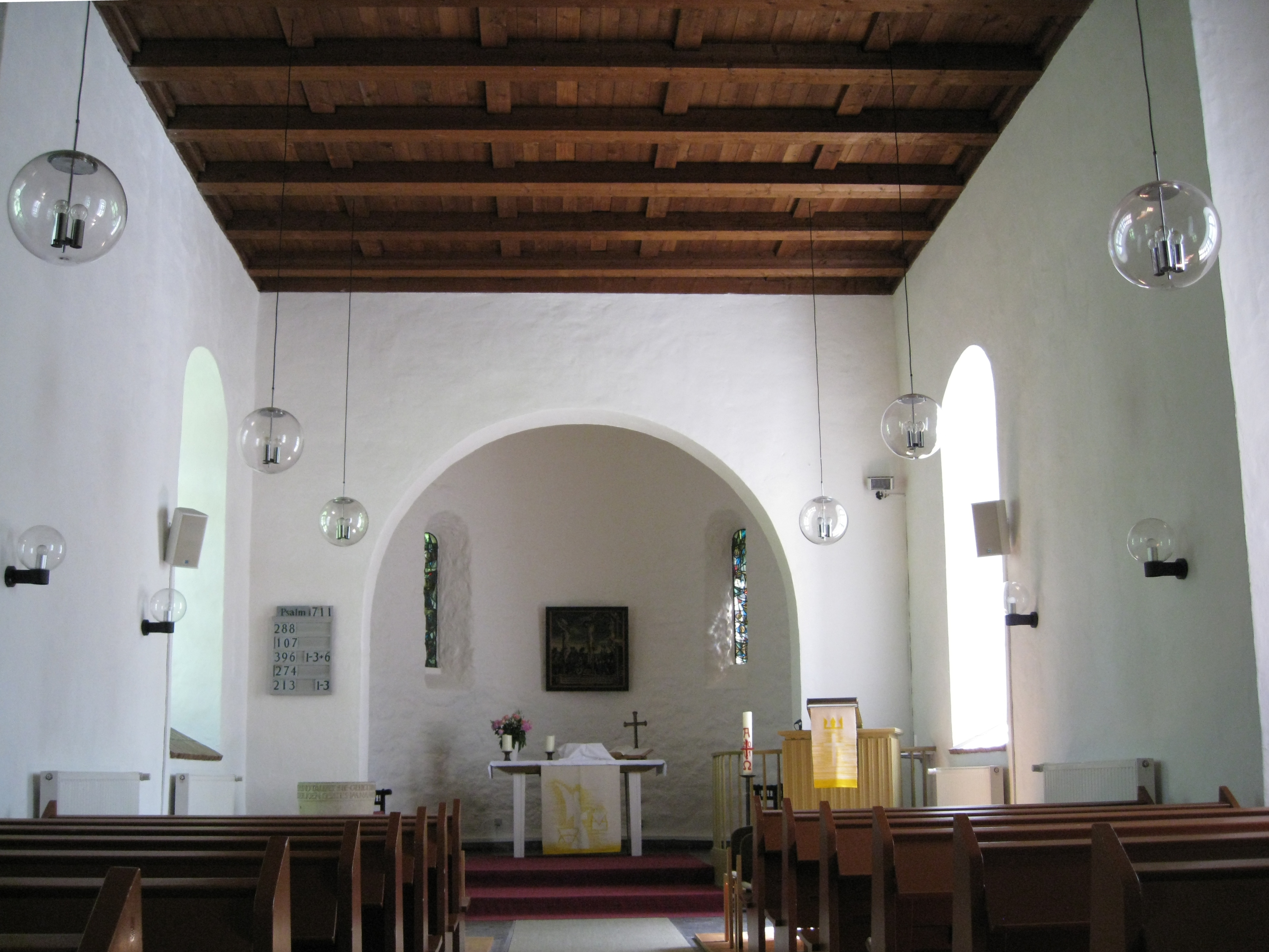 Innenraum der Dorfkirche Lankwitz, fotografiert von der Westpforte, Blick auf Chor und Apsis